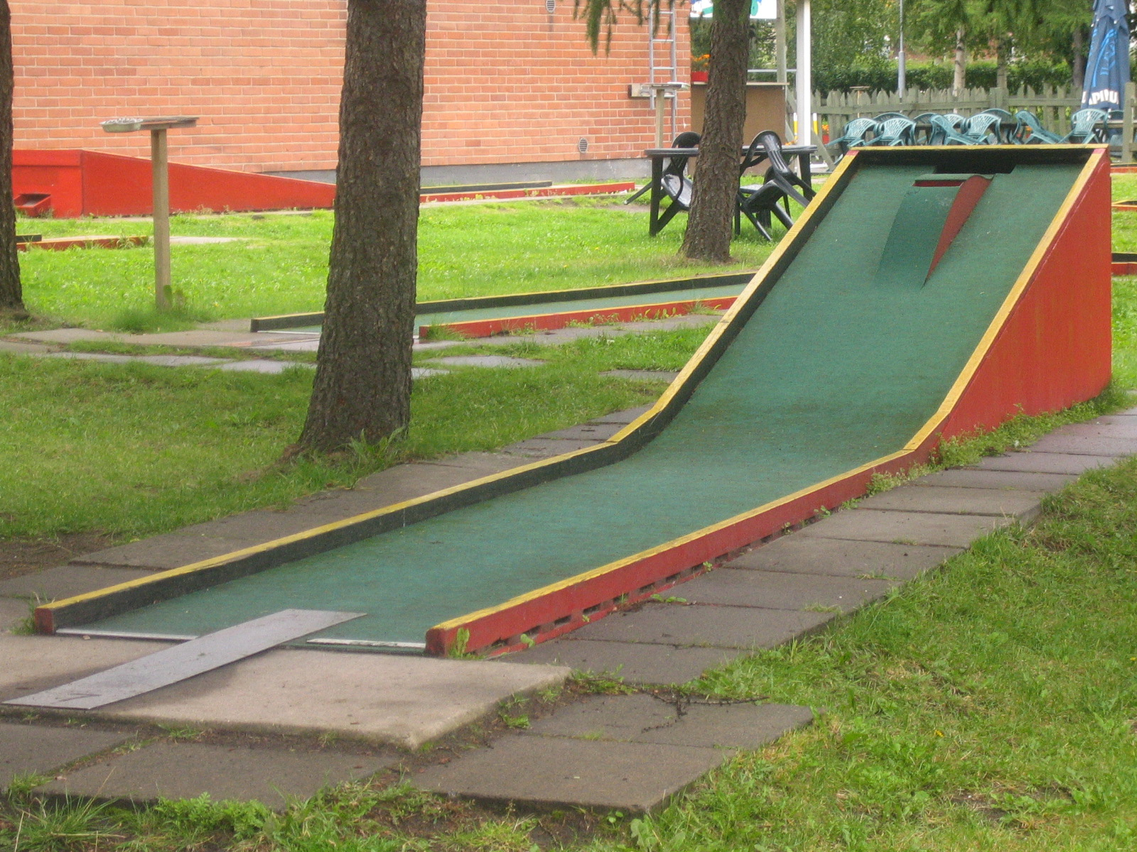 Minigolf in Oulu, in Finland